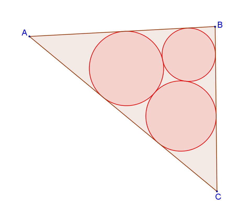 файл выполнен в среде GeoGebra